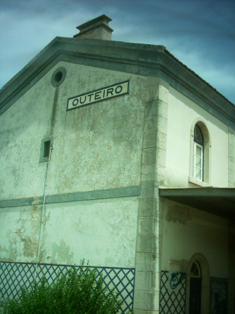 Estação ferroviária do Outeiro